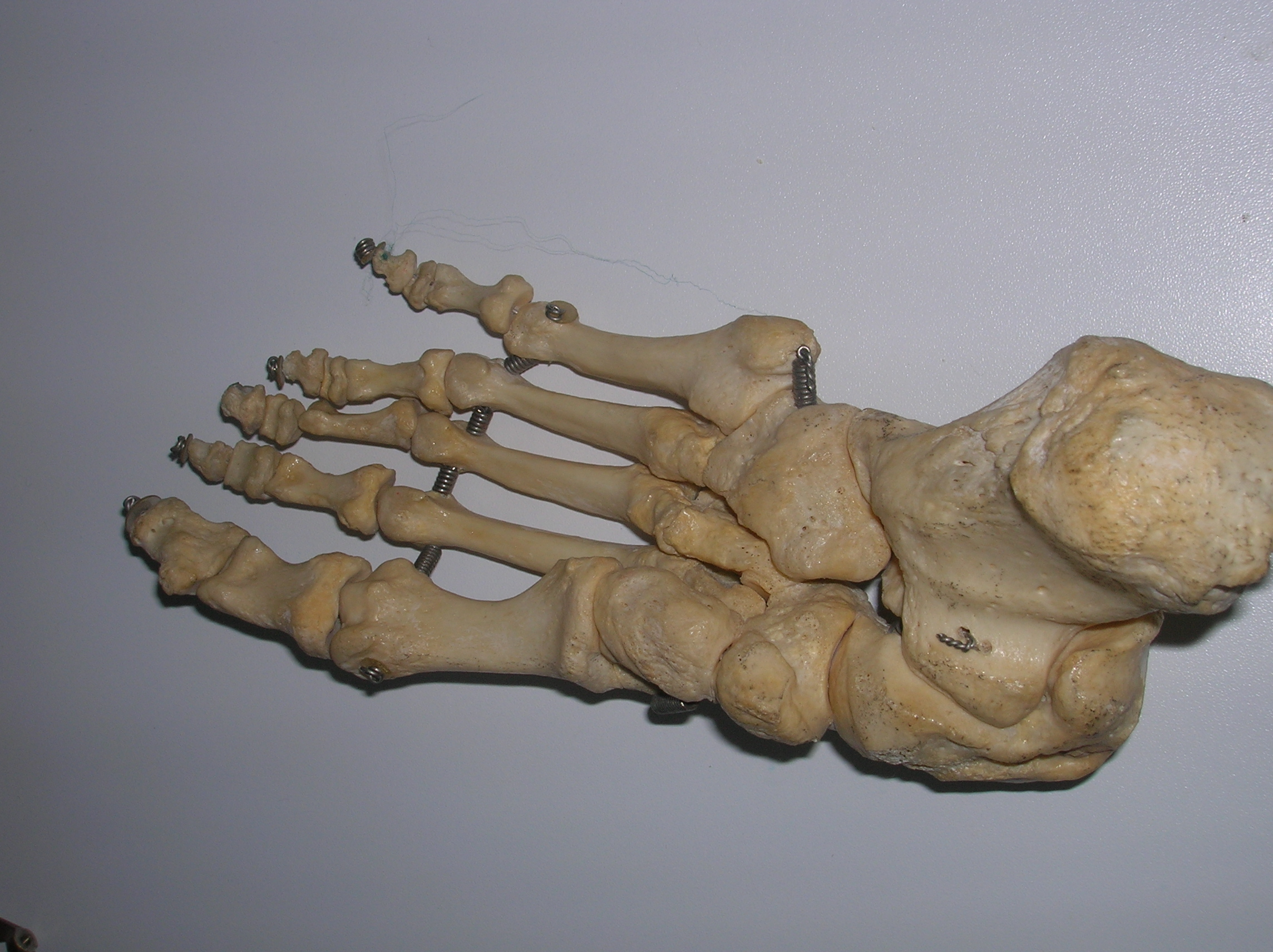 foot from a human skeleton